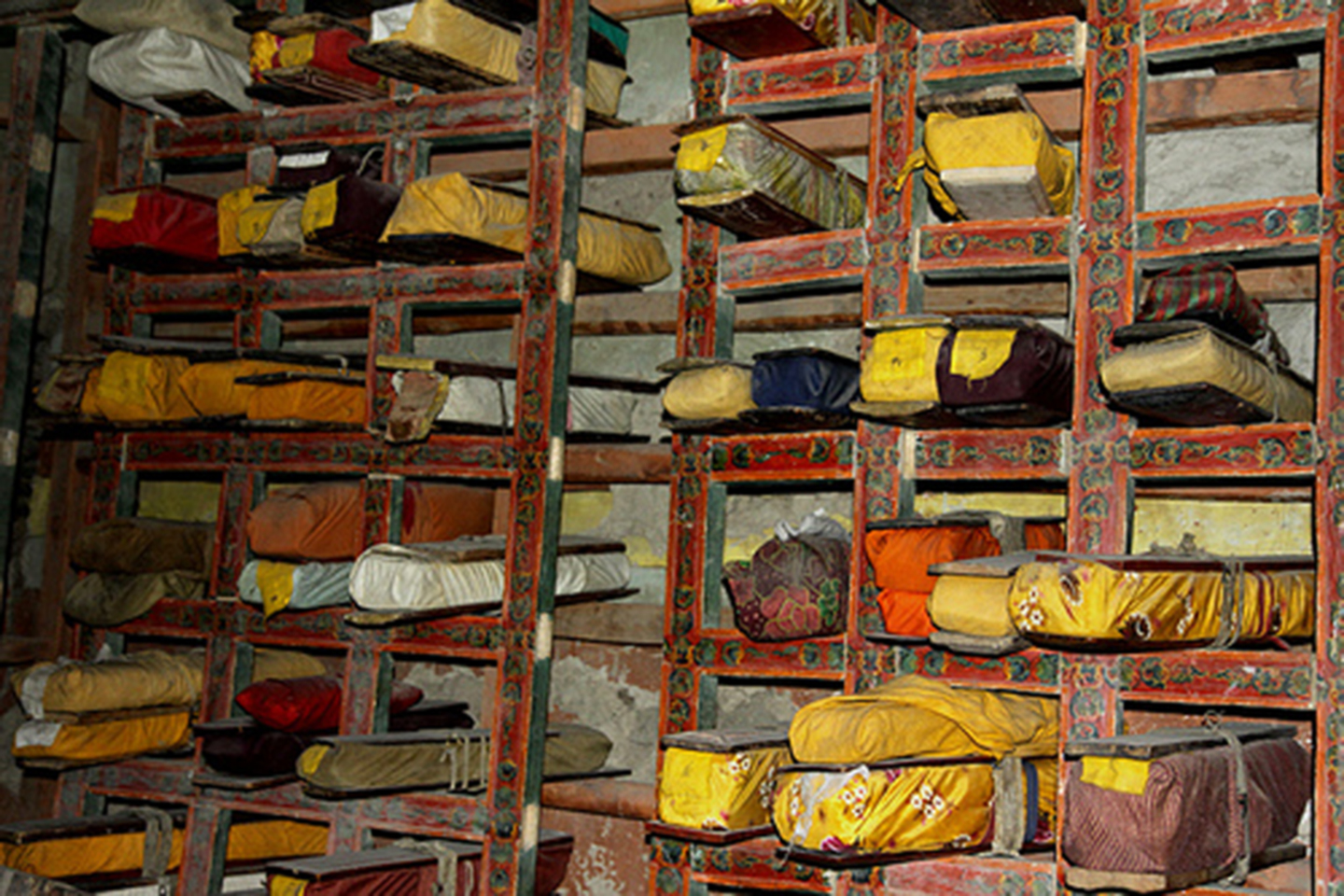 Klosterbibliothek in Rangdum Gompa, Zanskar, Ladakh, Jammu & Kaschmir, Indien